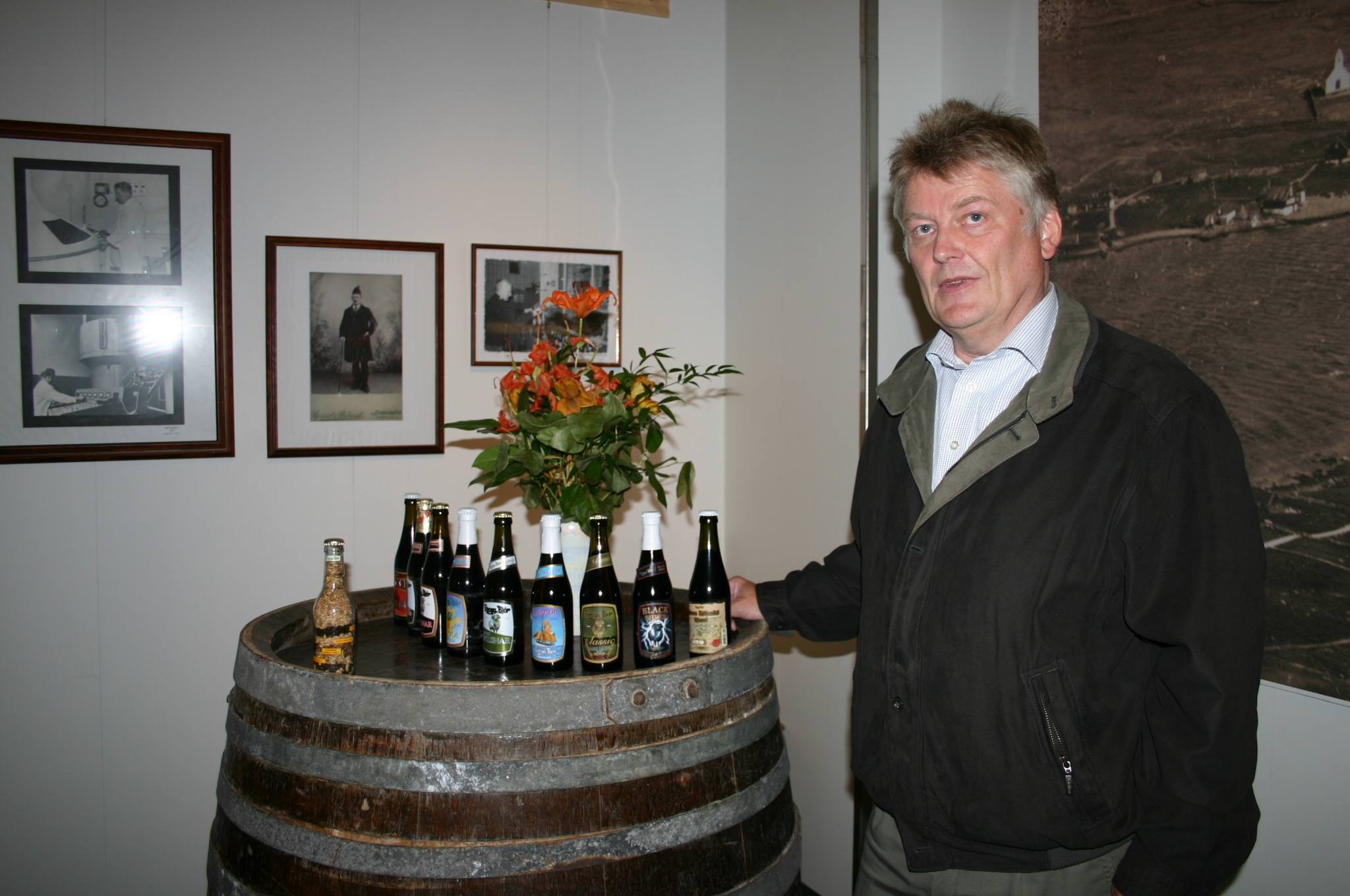 Föroya Bjór boss Einar Waag, Klaksvík, Faroe Islands.